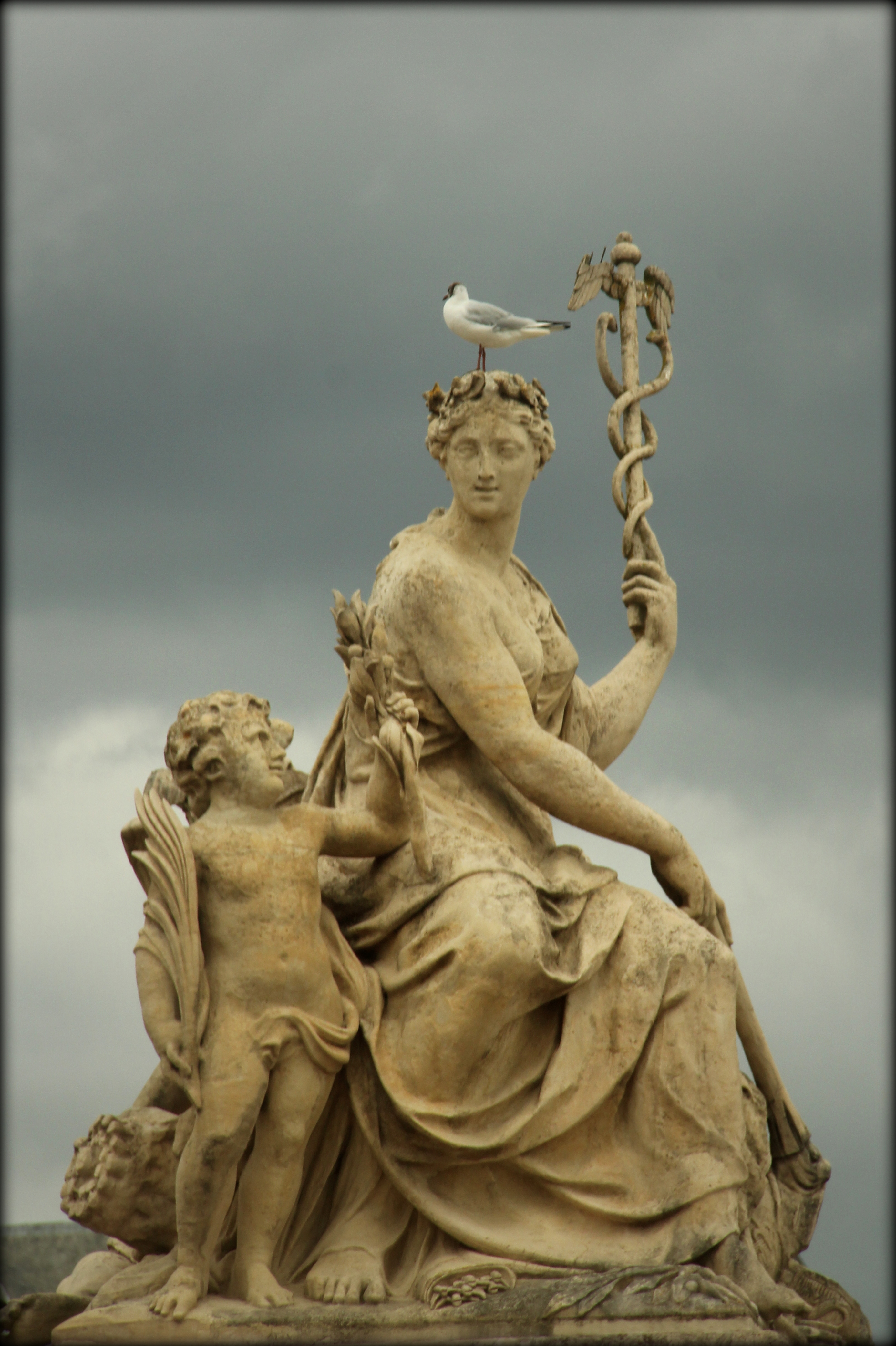 פסל ברחבת ארמון וורסאי